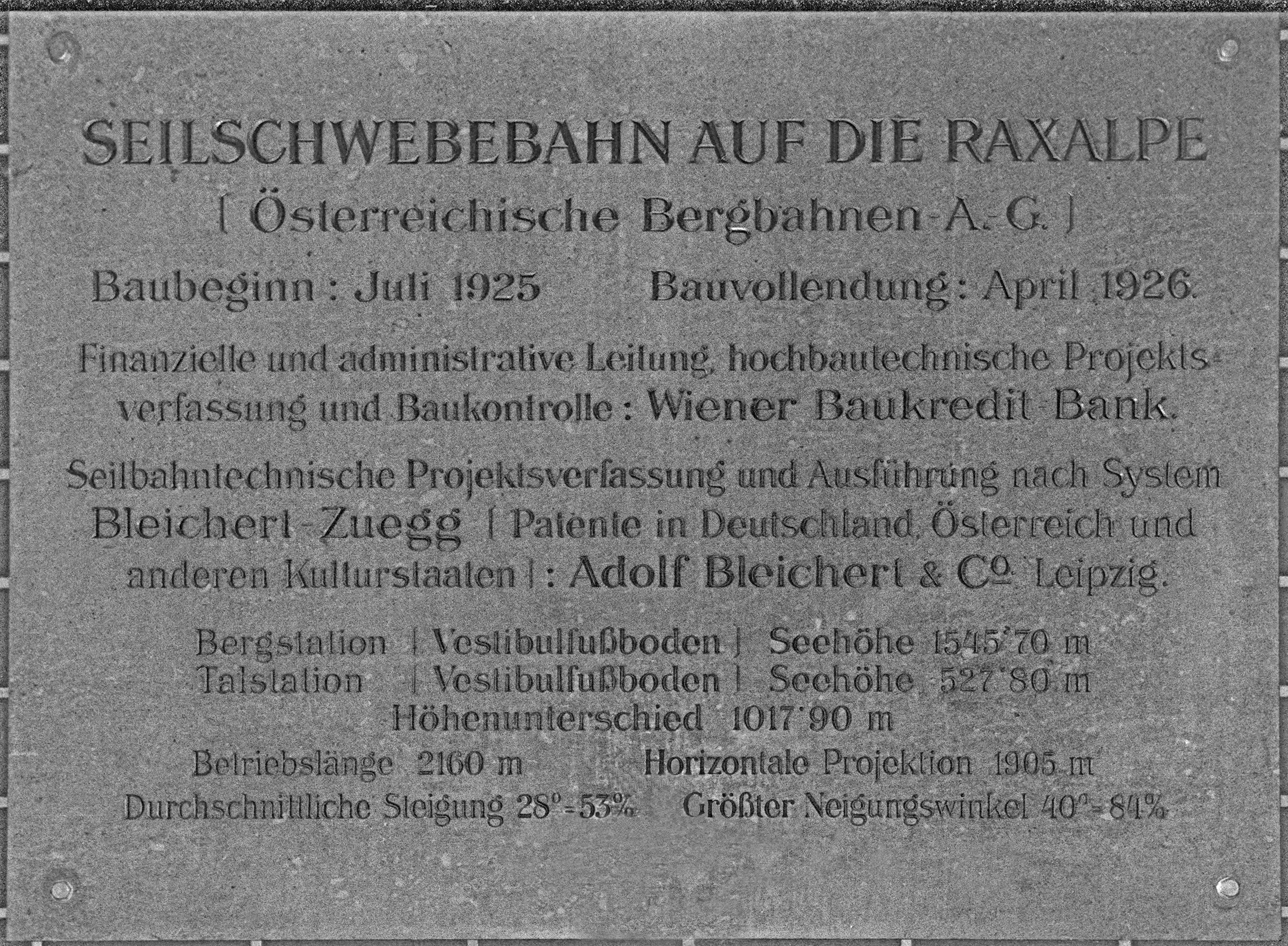 Plakette zur Eröffnung der Raxseilbahn, 1926